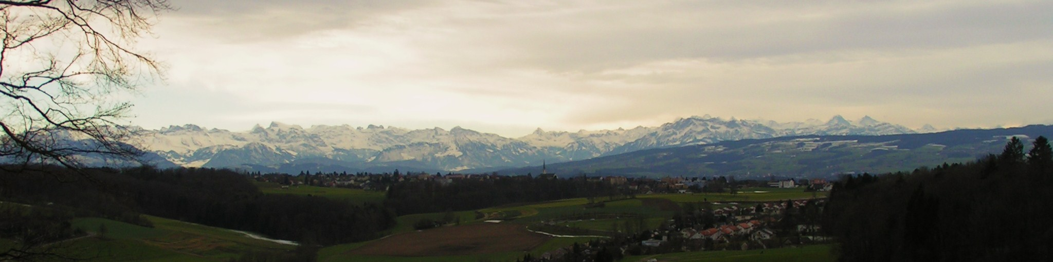 Blick vom Hasenberg über Berikon Richtung Alpennordseite bei Föhn